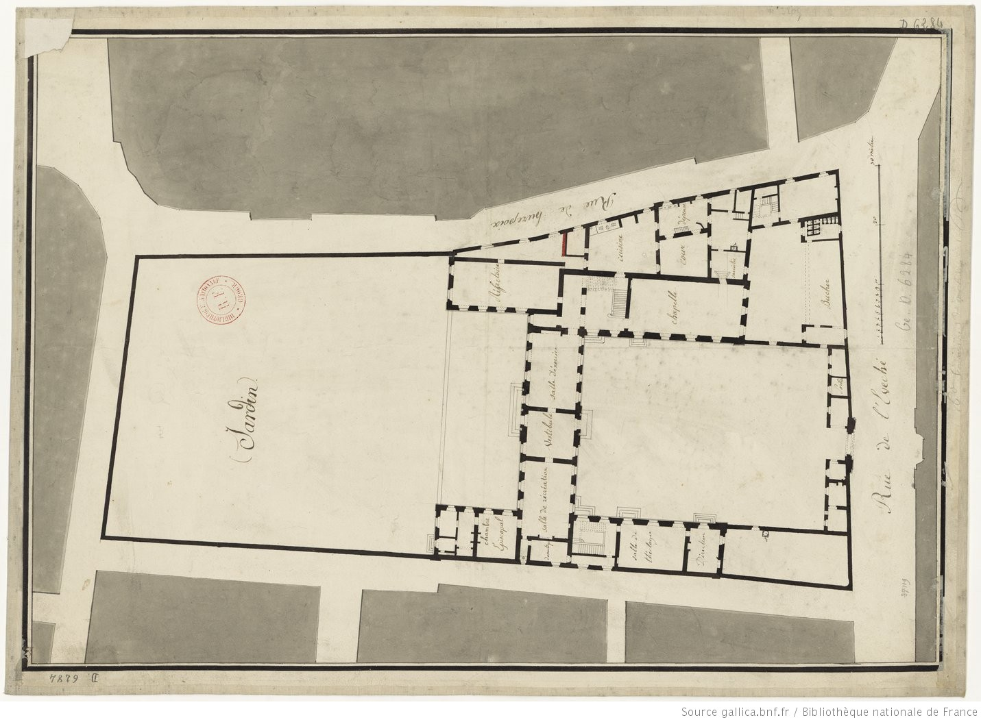 Plan du grand séminaire d'Orléans au XVIIIe siècle. Source BNF gallica.